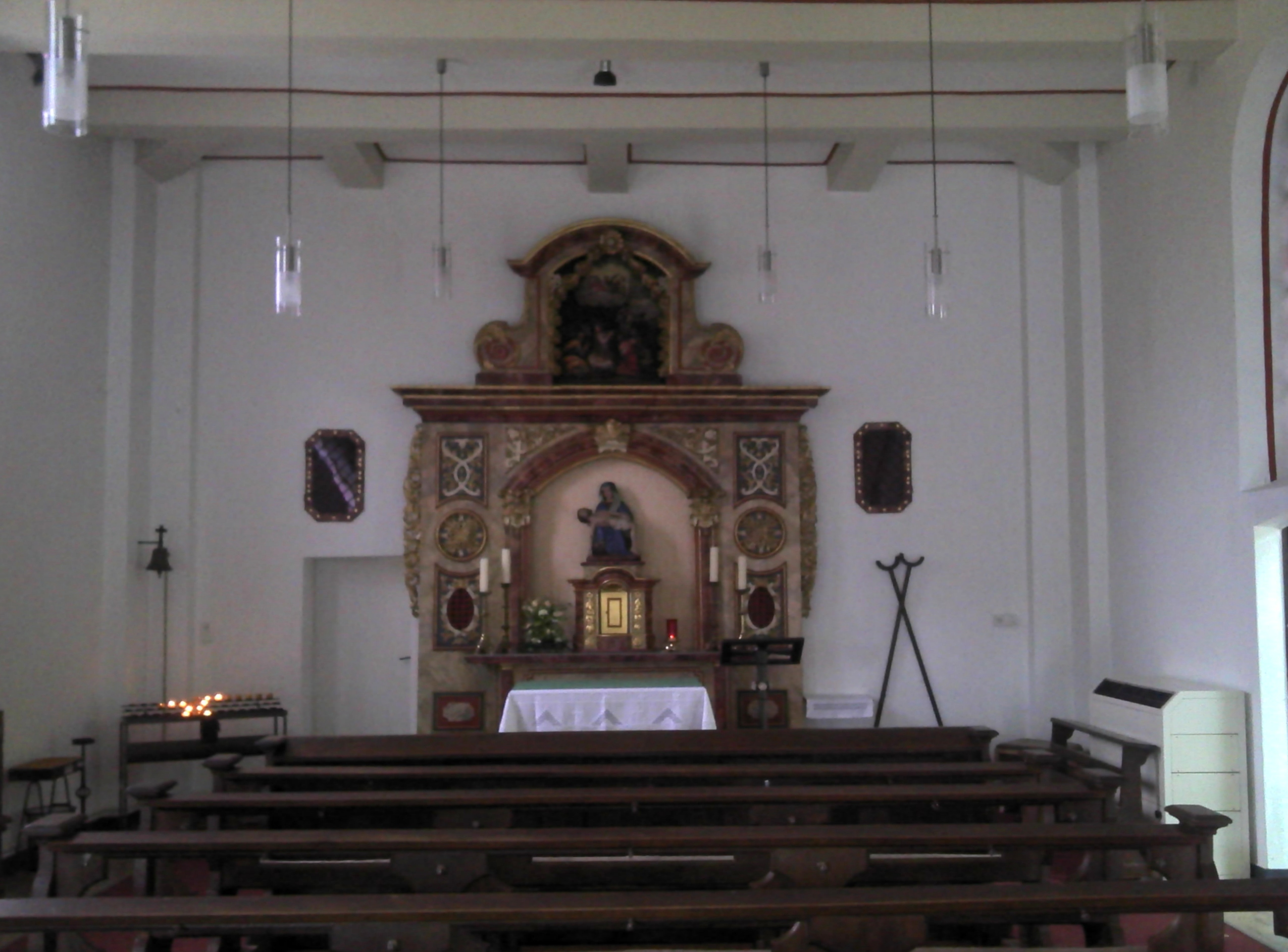 Wallfahrtskapelle zur Schmerzhaften Mutter von innen. Bauernschaft Buddenbaum, Ortsteil Hoetmar, Stadt Warendorf.